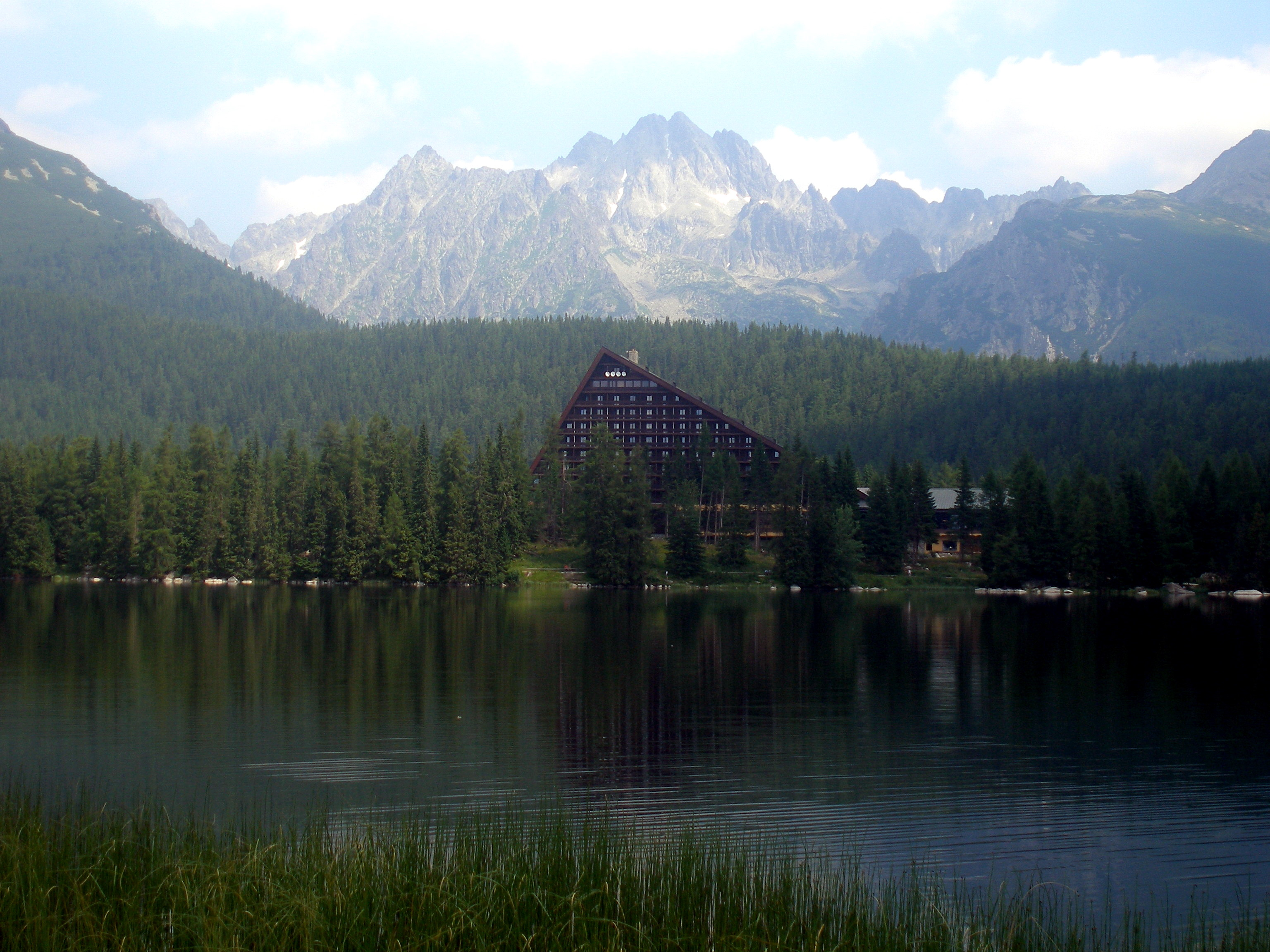 Tatranská osada Štrbské Pleso